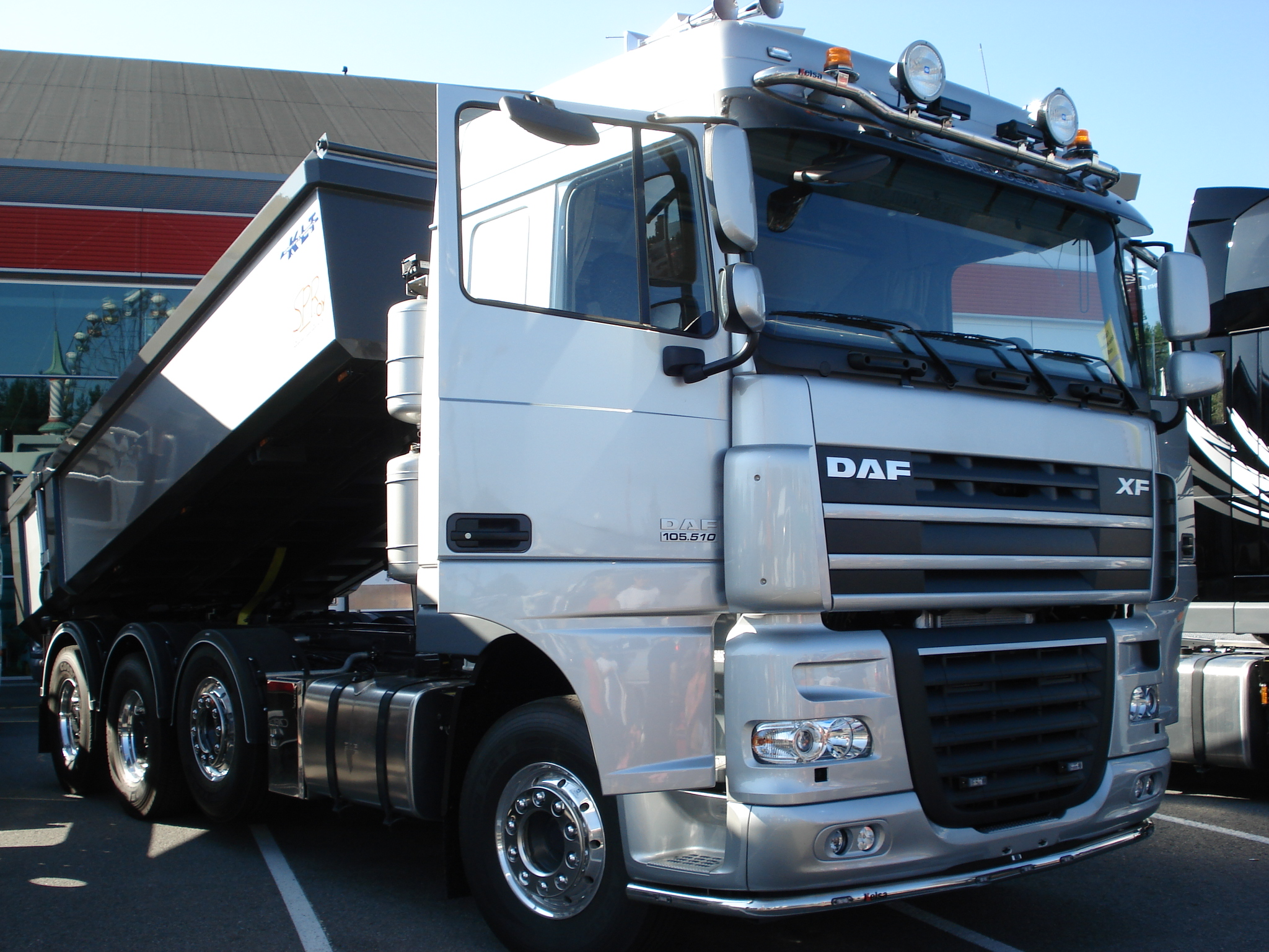 DAF XF 105.510